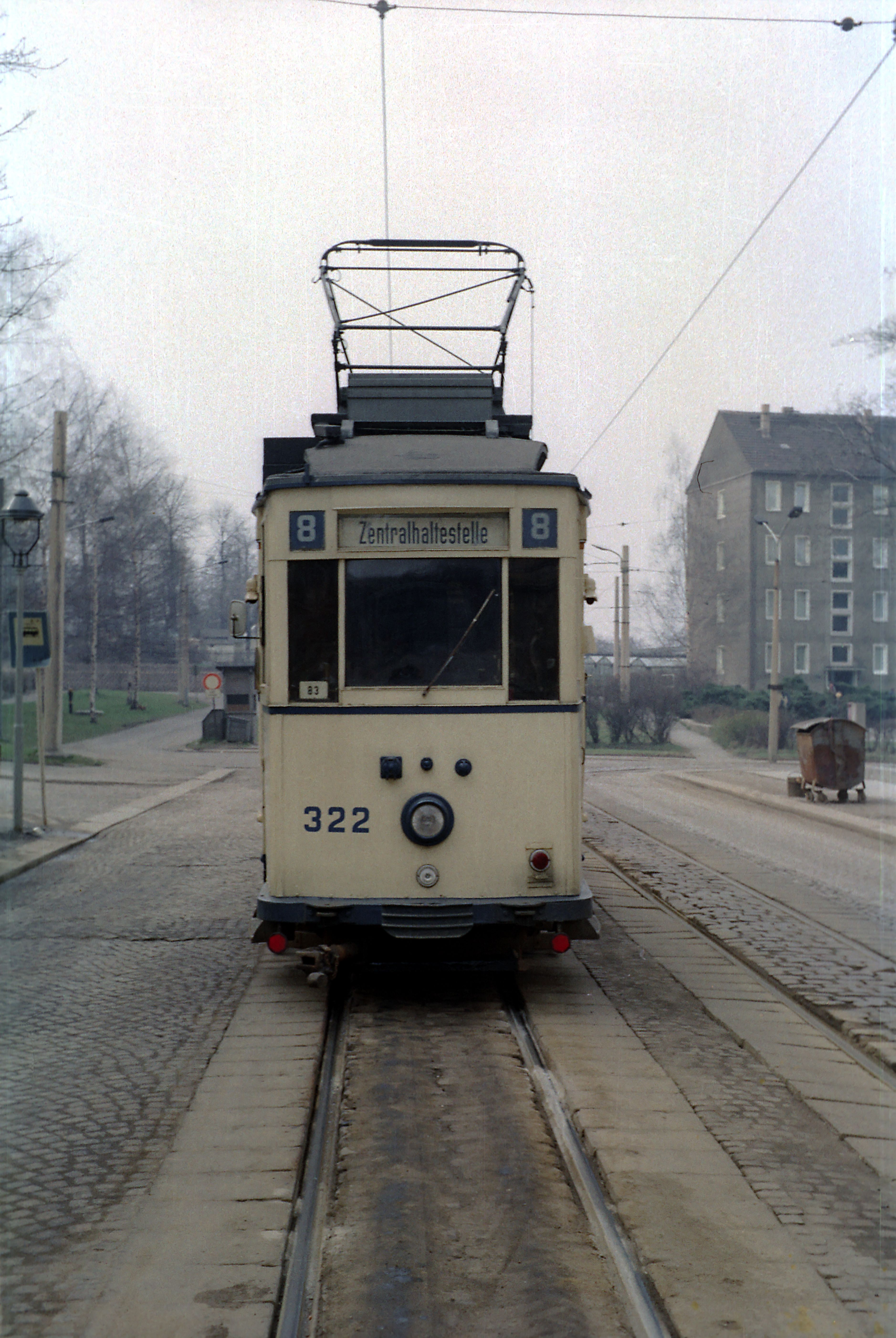 Zug der Linie 8, vorletzte Schmalspurlinie in Karl-Marx-Stadt (Chemnitz), vor der Abfahrt an der Endstelle Weststraße